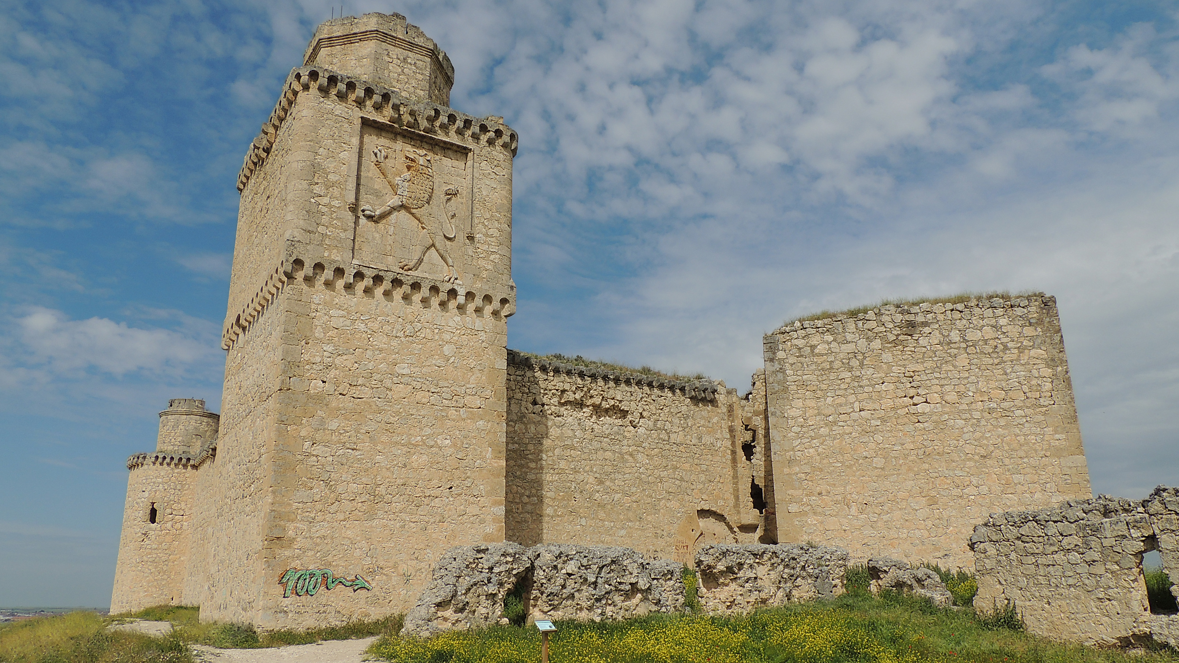 Vista del castillo de Barcience